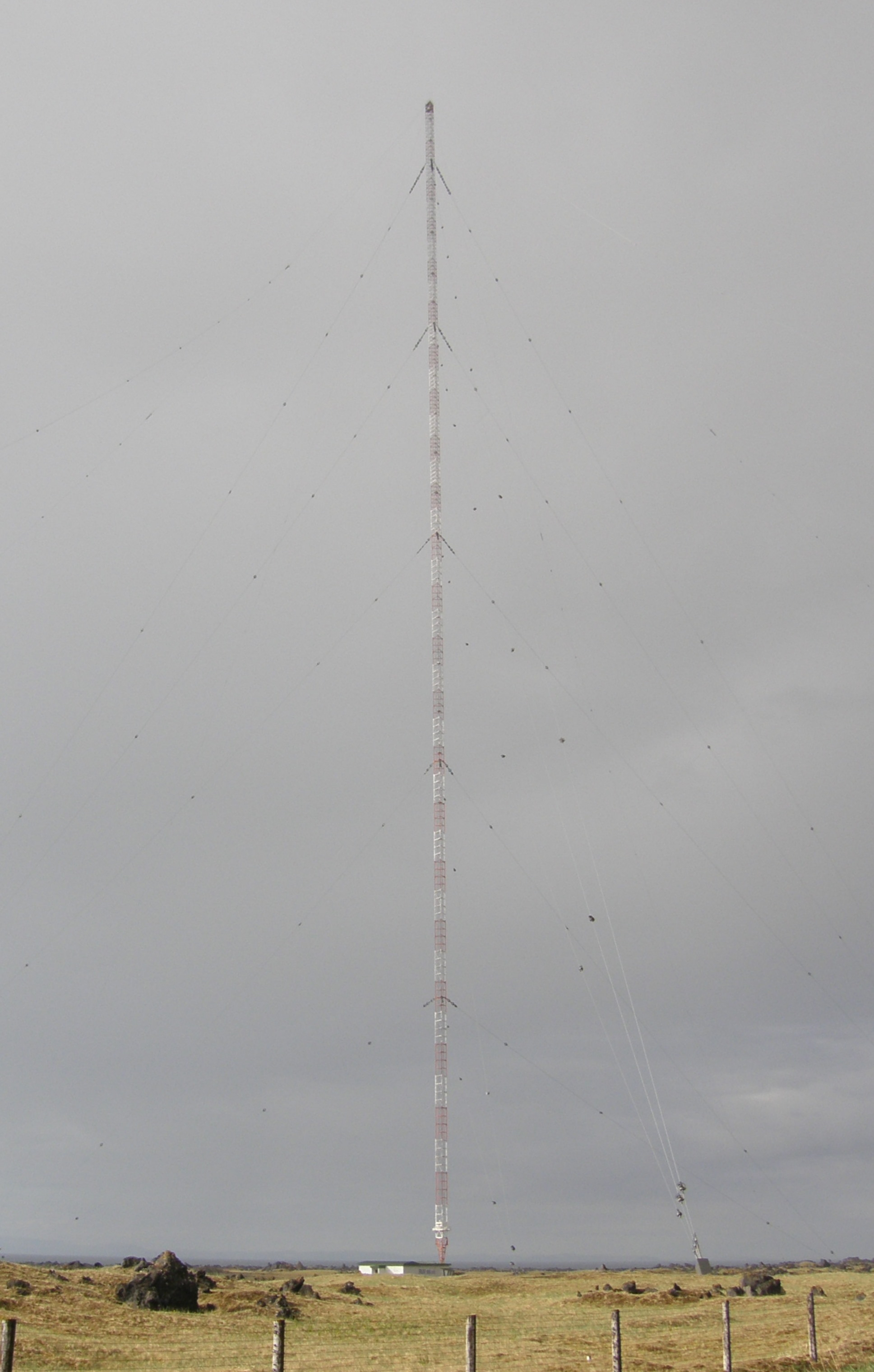 Pikklainesaatja Islandil GufuskalarisÍslenska: Langbylgjustöðin á Gufuskálum